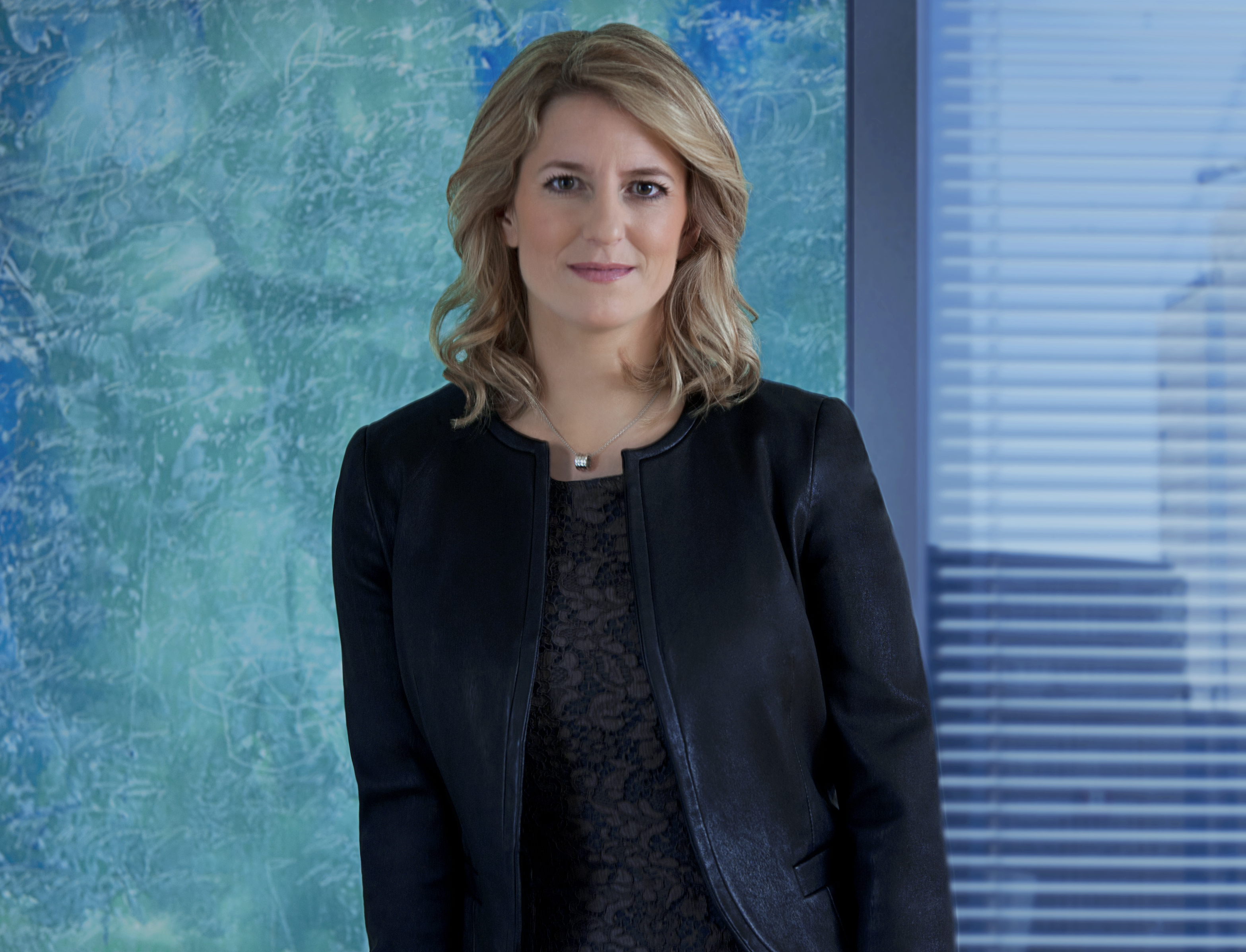 Dr. Nicole Grünewald, Präsidentin der IHK Köln